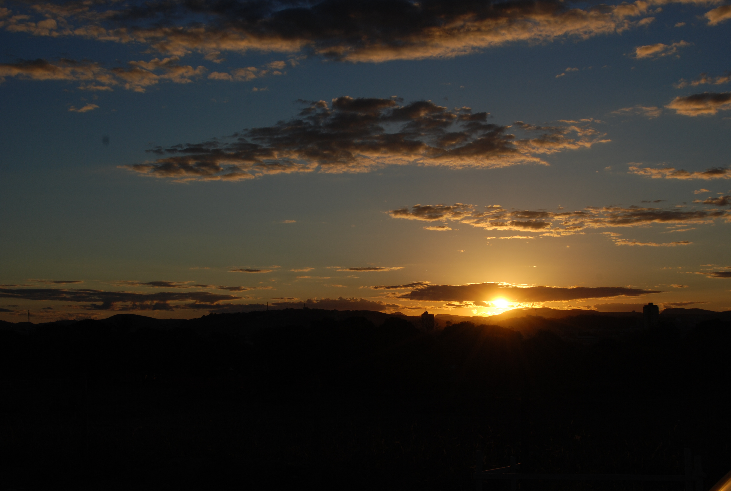 Por do sol